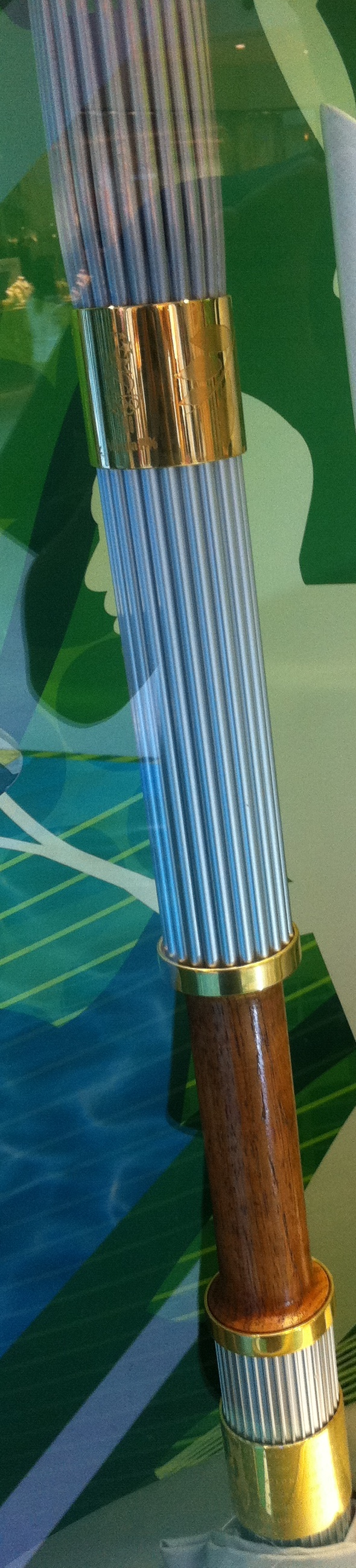 1996年夏季奧運會火炬